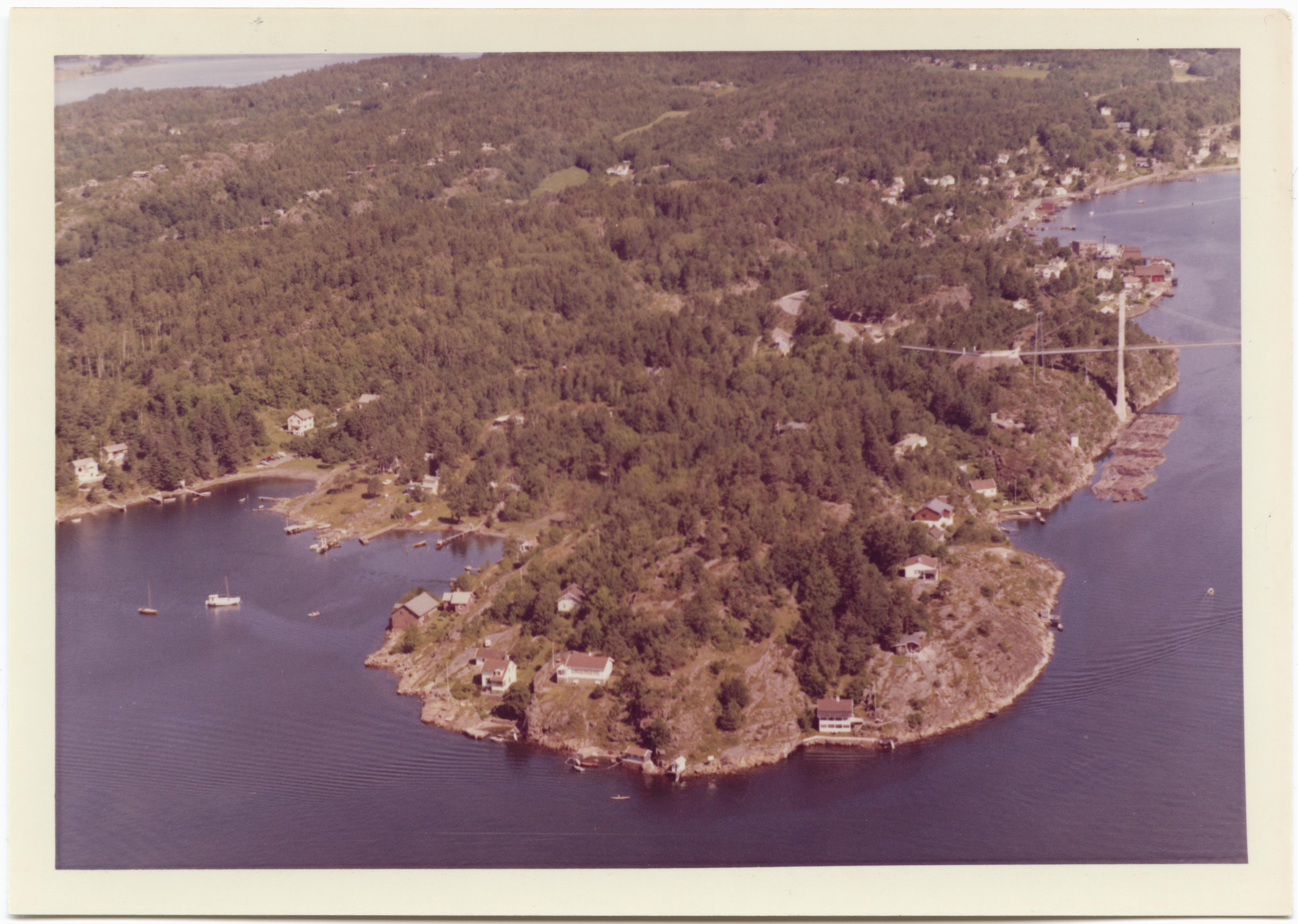 WF.S.185240 Vrengen bro